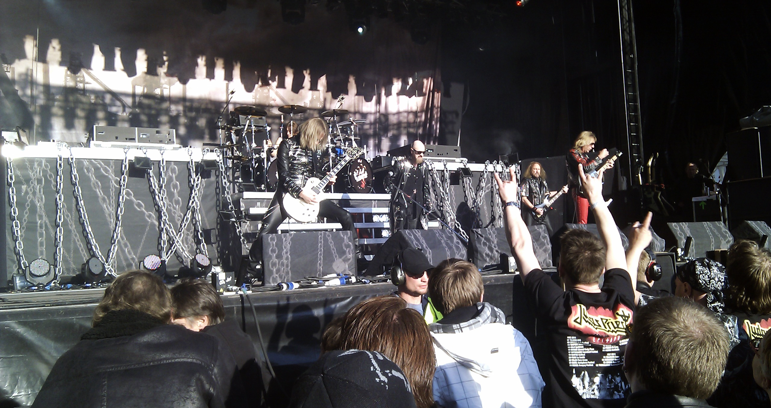 Judas Priest 15. juni 2011 Edvard Griegs Plass